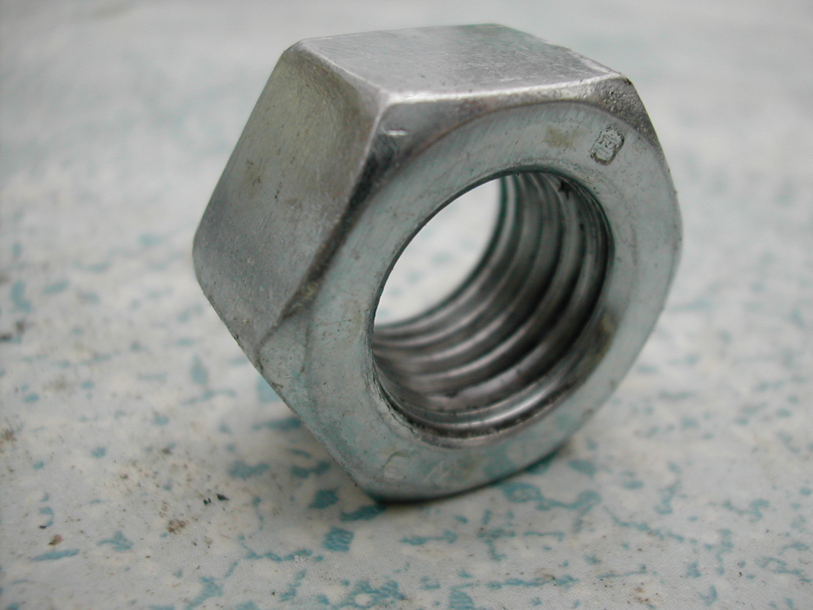 Ecrou hexagonal